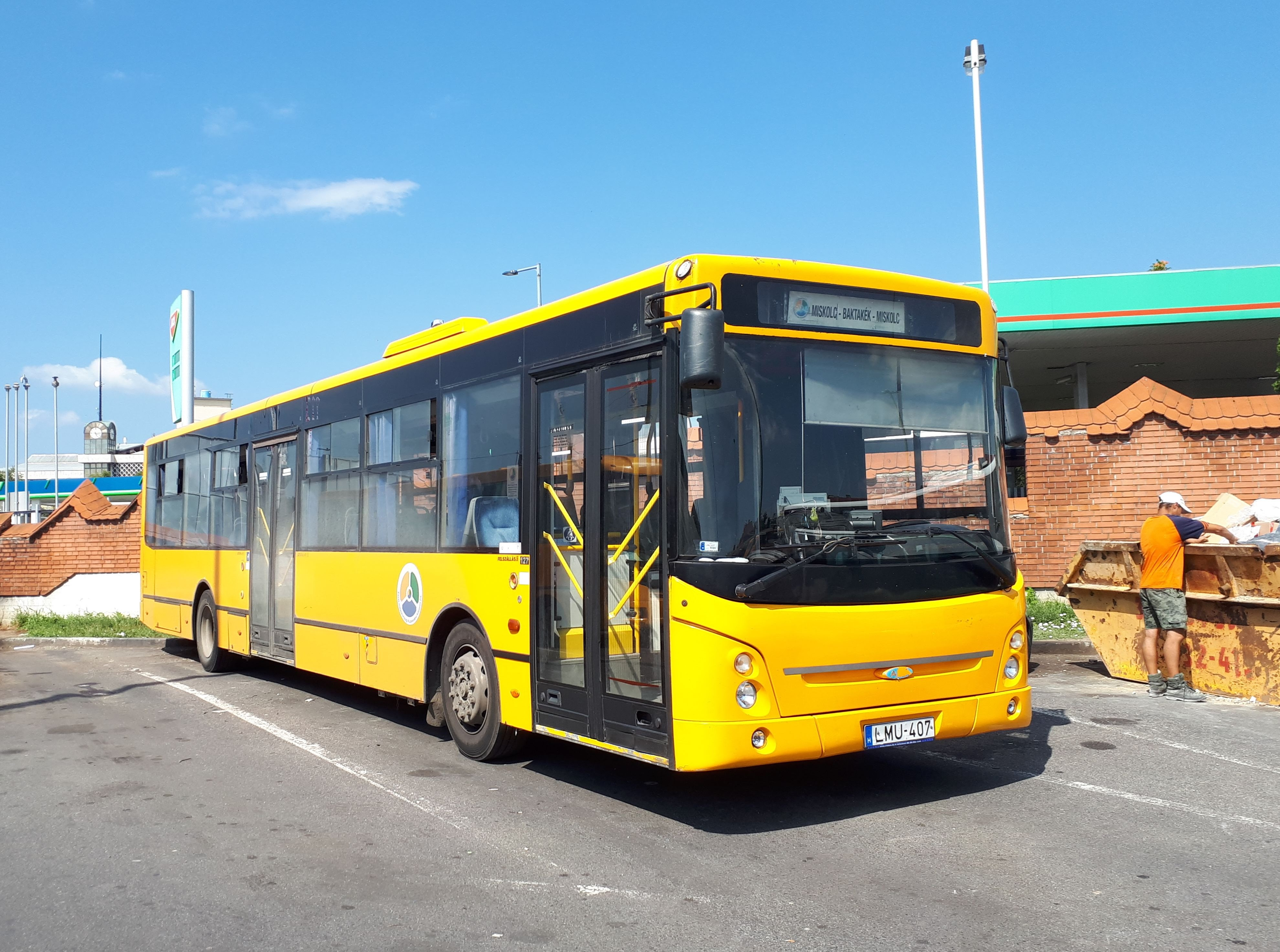 Az ÉMKK LMU-407 rendszámú Ikarus-ARC E127 típusú busza Miskolcon, a 3716-os helyközi járaton.